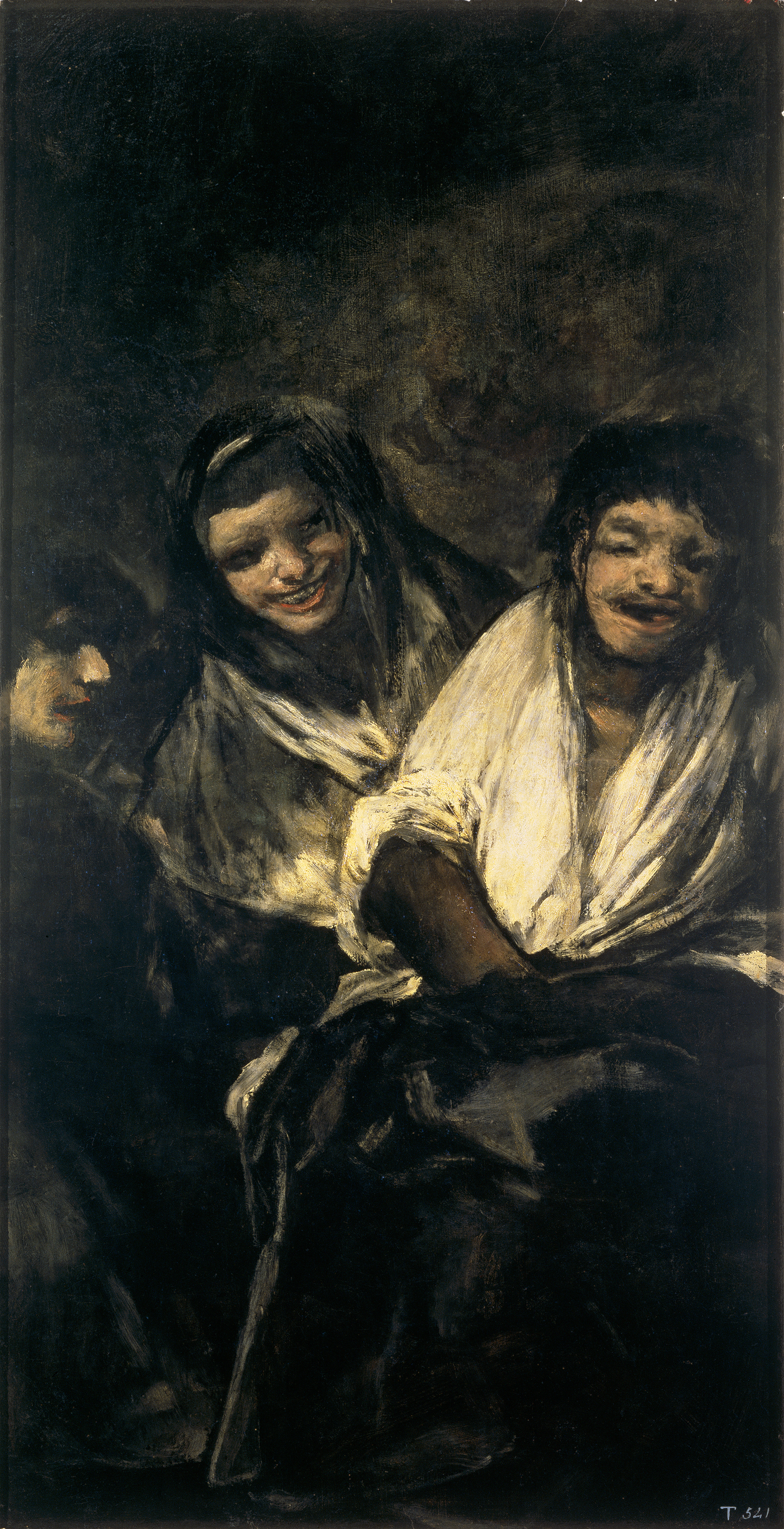 Mujeres riendo, Dos mujeres y un hombre, Dos mujeres, Dos mujeres riéndose de un hombre o Dos mujeres riéndose a mandíbula batiente, técnica mixta sobre revestimiento mural, 125 x 66 cm. Pintura al óleo sobre muro trasladada a lienzo. Museo del Prado (Madrid).